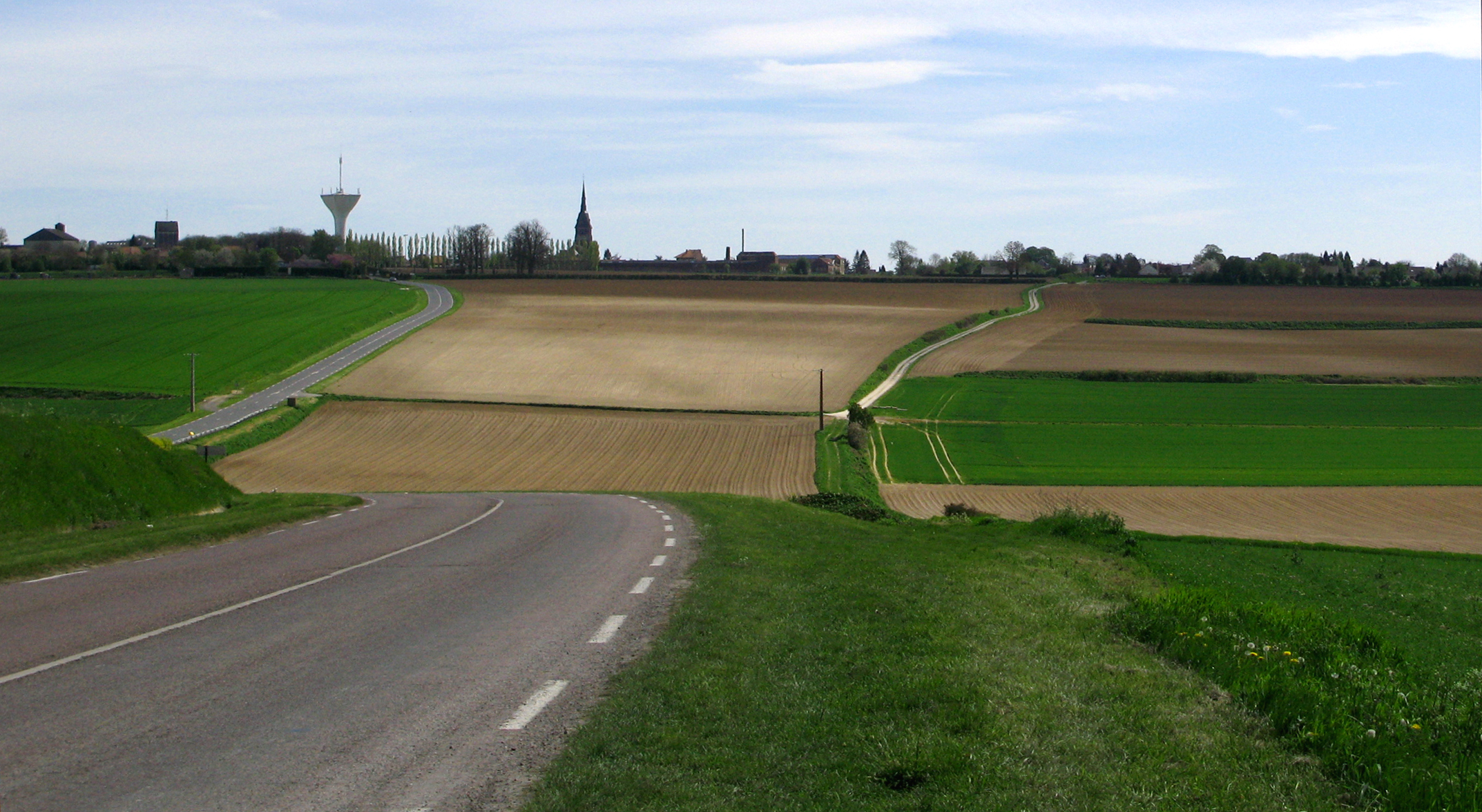 Villers-Bretonneux (Somme, France) - Vue depuis le parking du cimetière militaire et du Mémorial National Australien (depuis la route départementale D 23, en provenance de Corbie et Fouilloy). . .